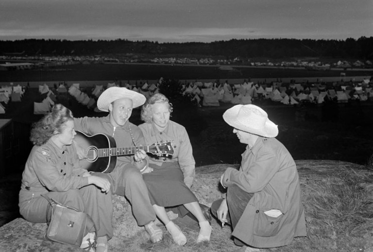 Skarpnäcksfältet, Socialdemokratiskt ungdomsläger